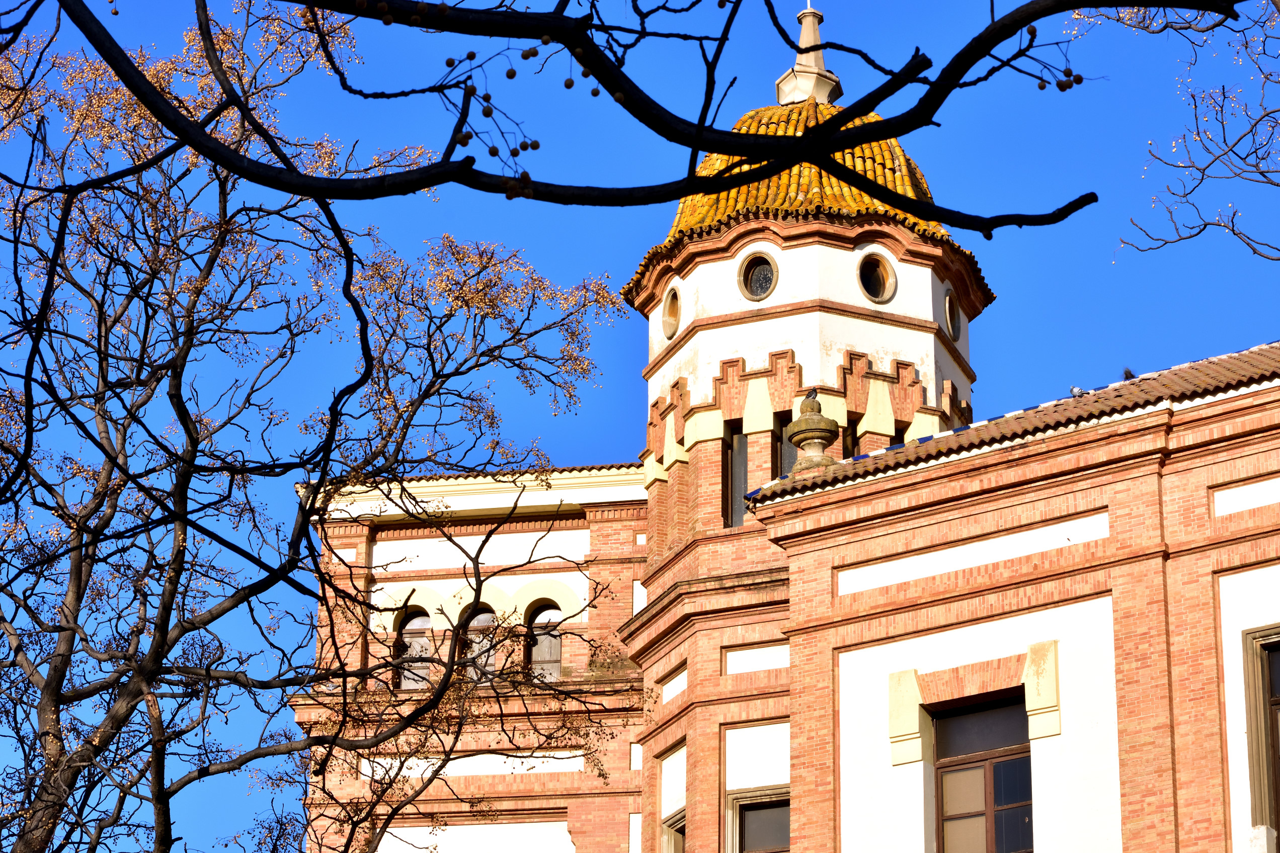 Esquina sur-este del edificio del IES La Rábida.